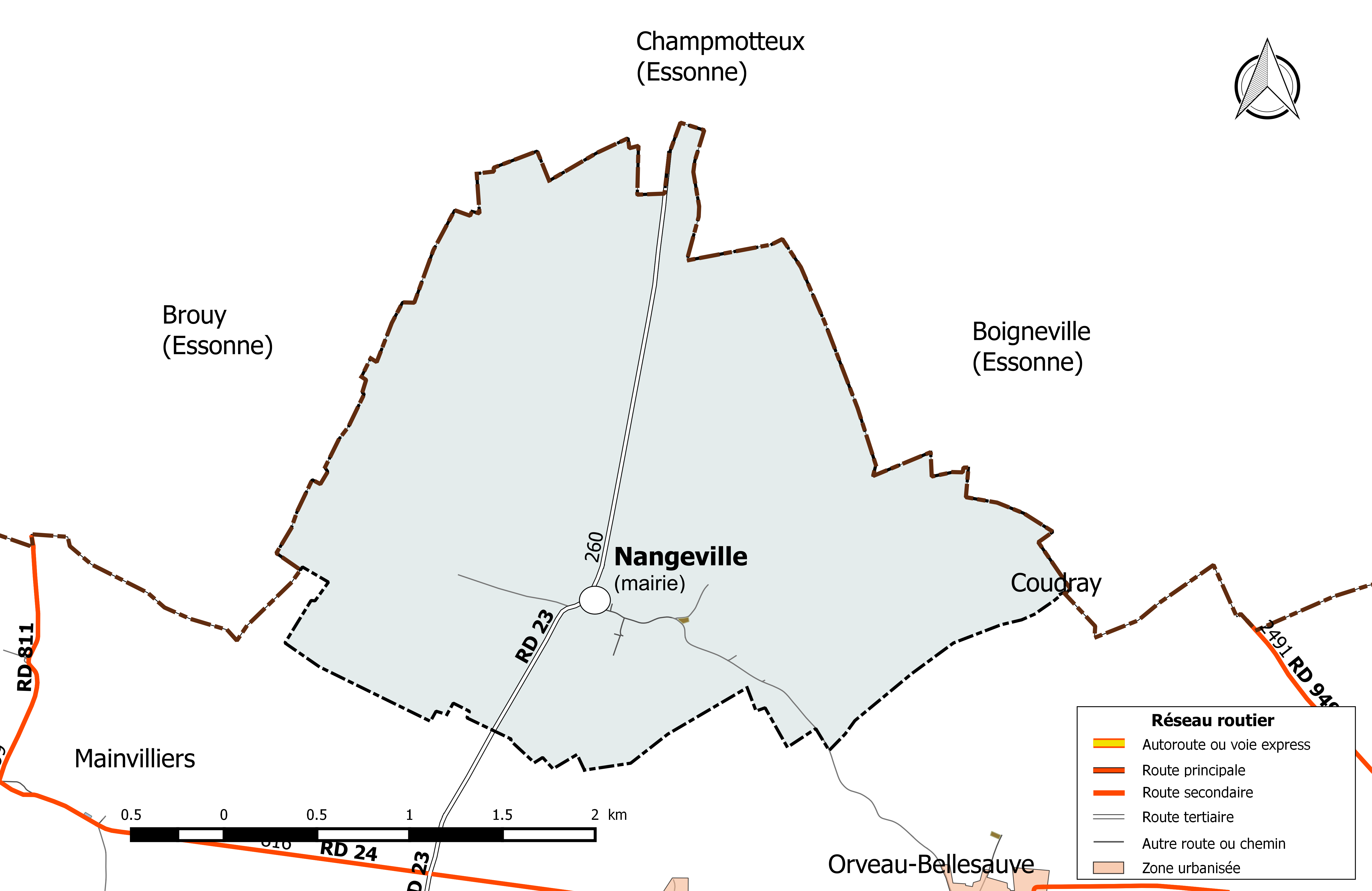 Carte du réseau routier de la commune de Nangeville.